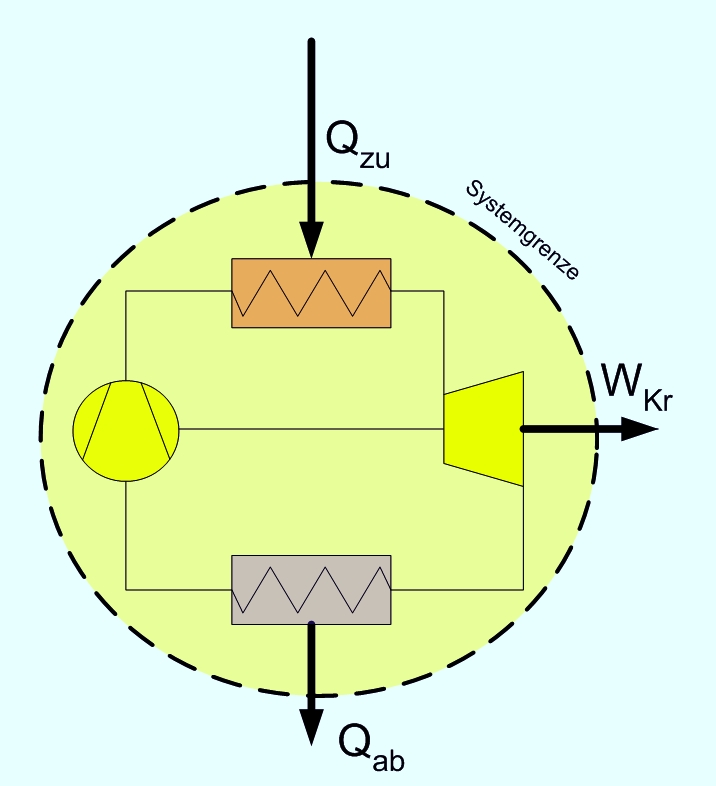 1. Hauptsatz für den Kreisprozess